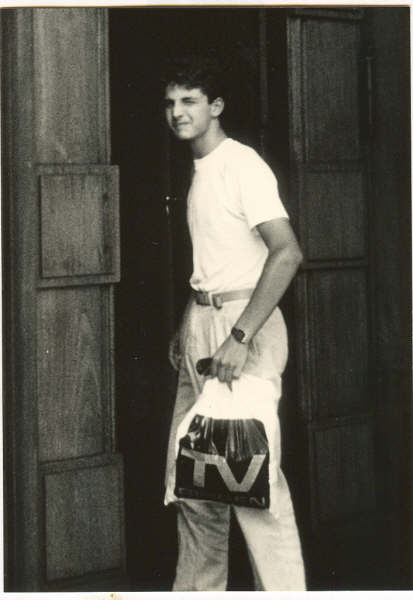 Den første politikerrunde Folkeskoleelevernes Landsorgansation gennemførte med alle de politiske partier var i 1984. Her FLOs daværende næstformand Thomas Truelsen ved indgangen til Christiansborg på vej ind til det allerførste møde i denne serie af møder.